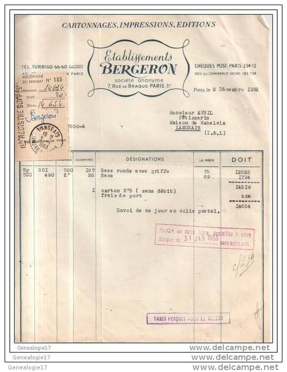 facture des établissements Bergeron